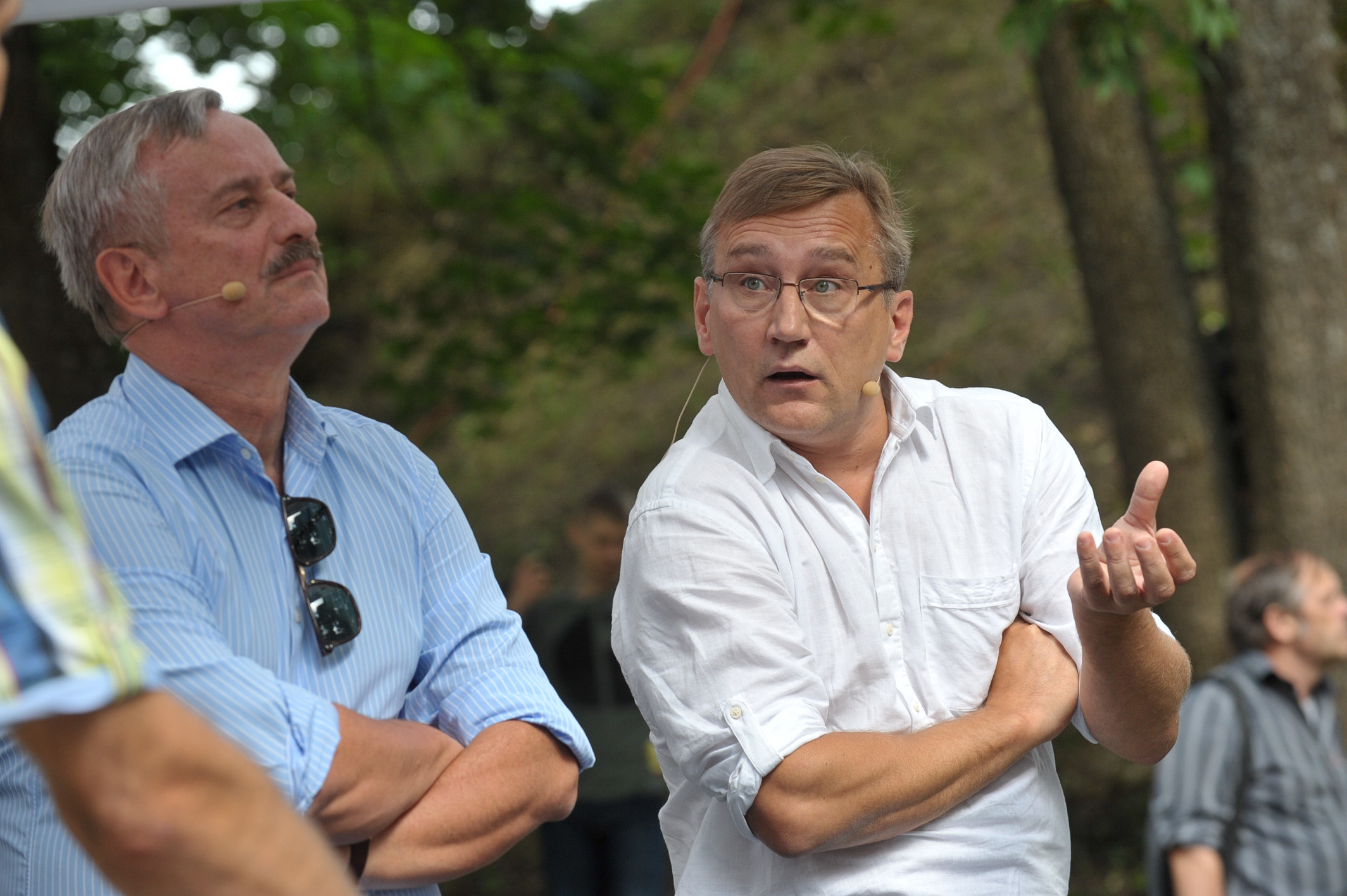 Arvamusfestival 2014: "Endised peaministrid, mida teeksime täna teisiti"